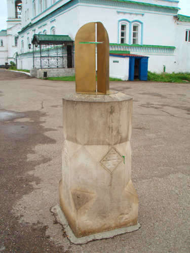 Оригинальный гномон в Раифском Богородицком монастыре